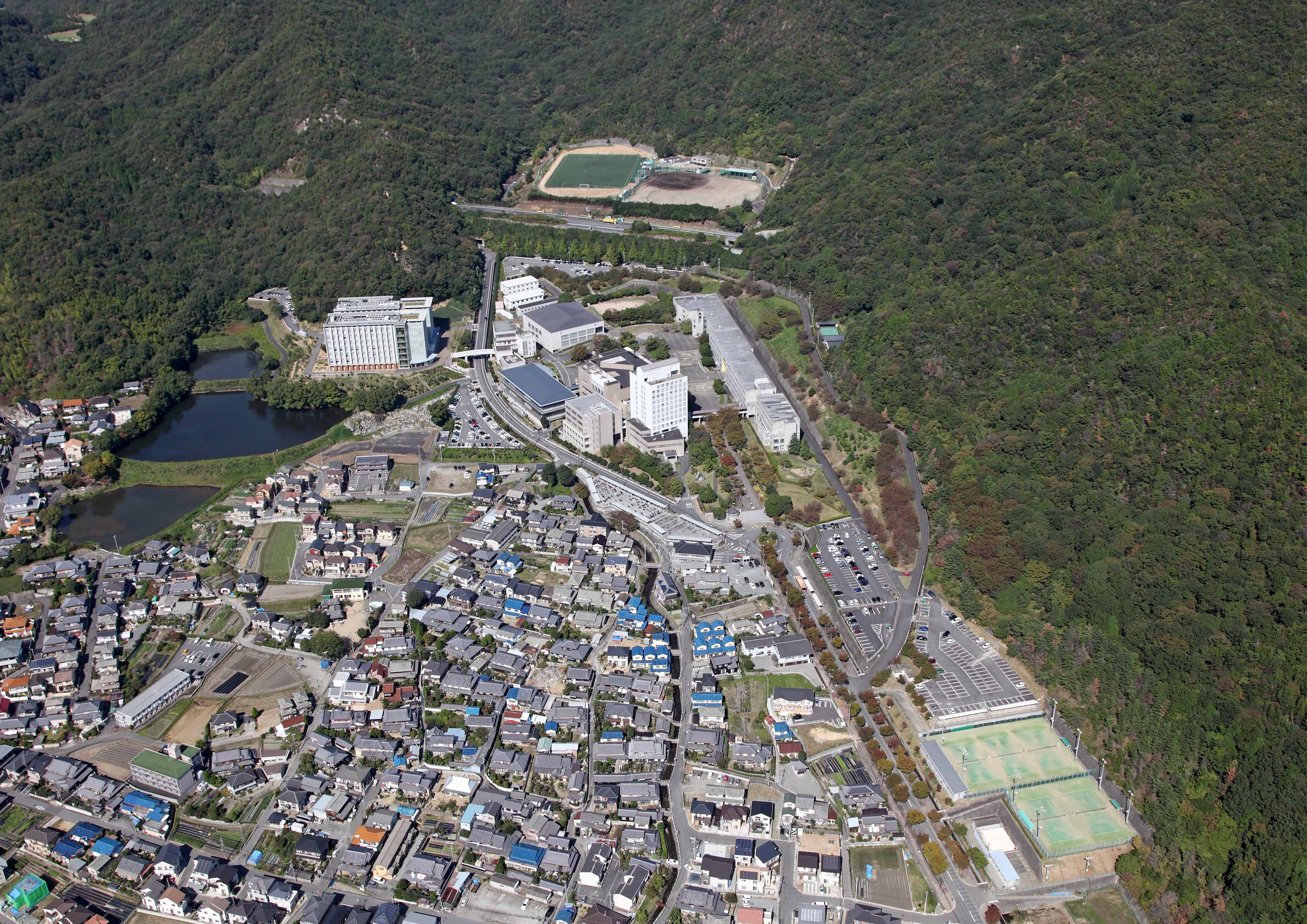 姫路獨協大学上空より